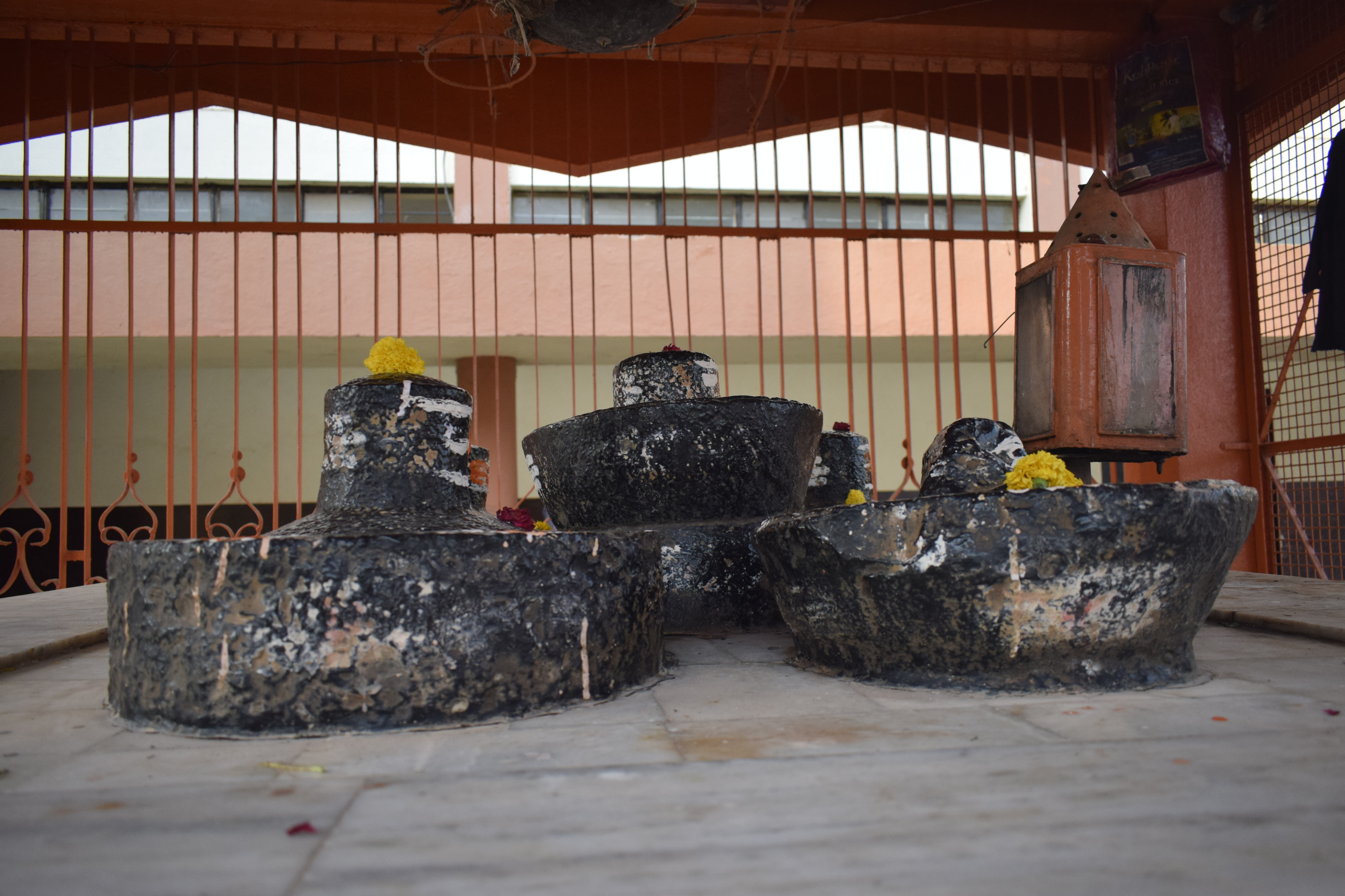 श्री उमामहेश्वर लिंग